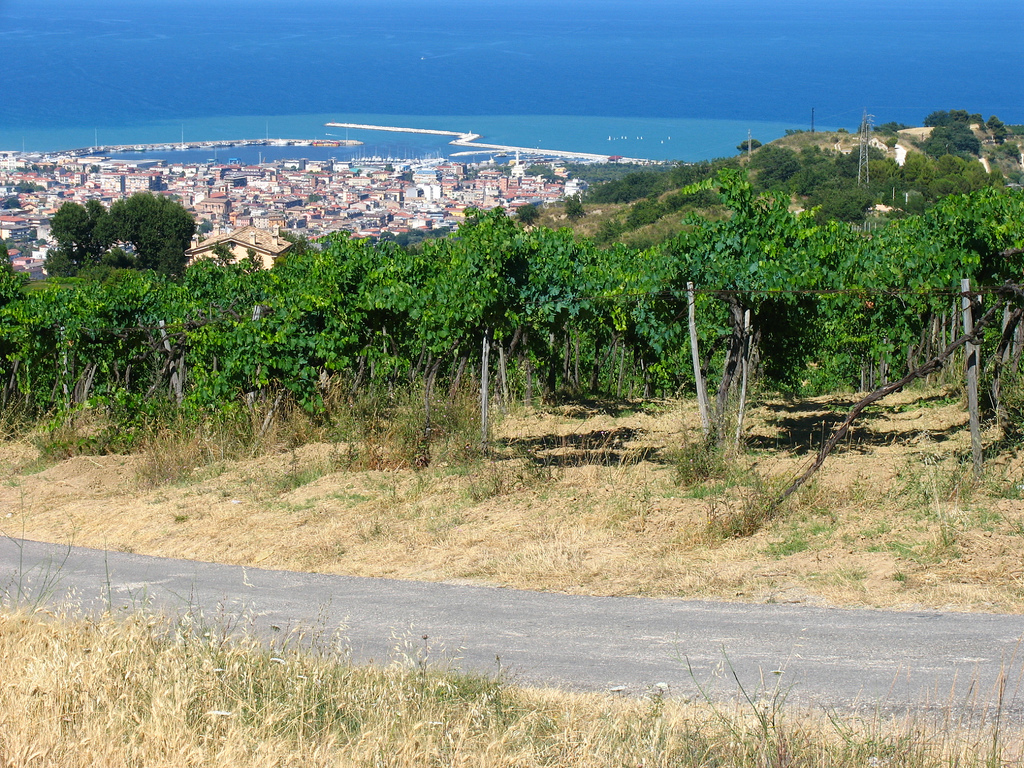 San Benedetto del Tronto, Marche, Italia